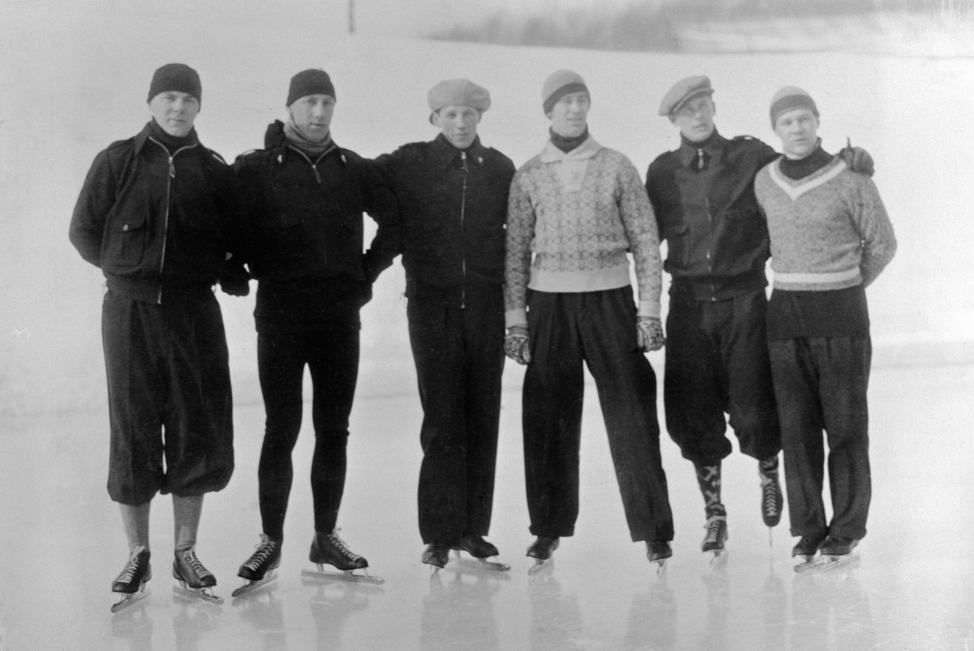 DEN NORSKE OL-TROPPEN, SKØYTER. Se Idrett i Hamar gjennom 100 år. bilde nr. 155 Bernt Evensen, Haakon Pedersen, Erling Lindboe, Michael Staksrud, Ivar Ballangrud, Hans Engnestangen